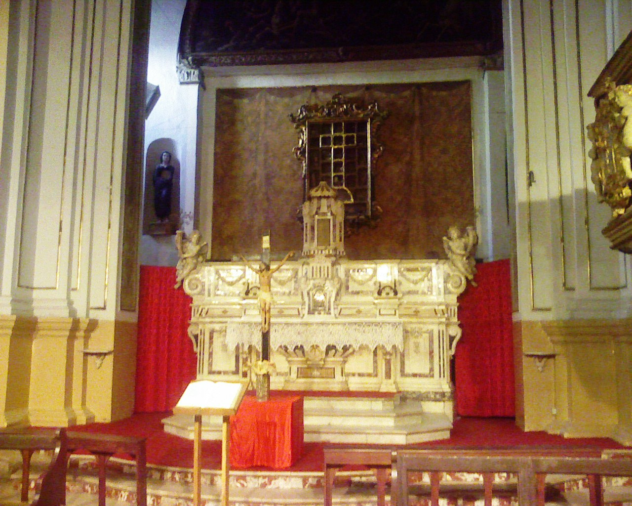 Chiesa Maria Santissima Annunziata - Modugno (Bari) - Italy